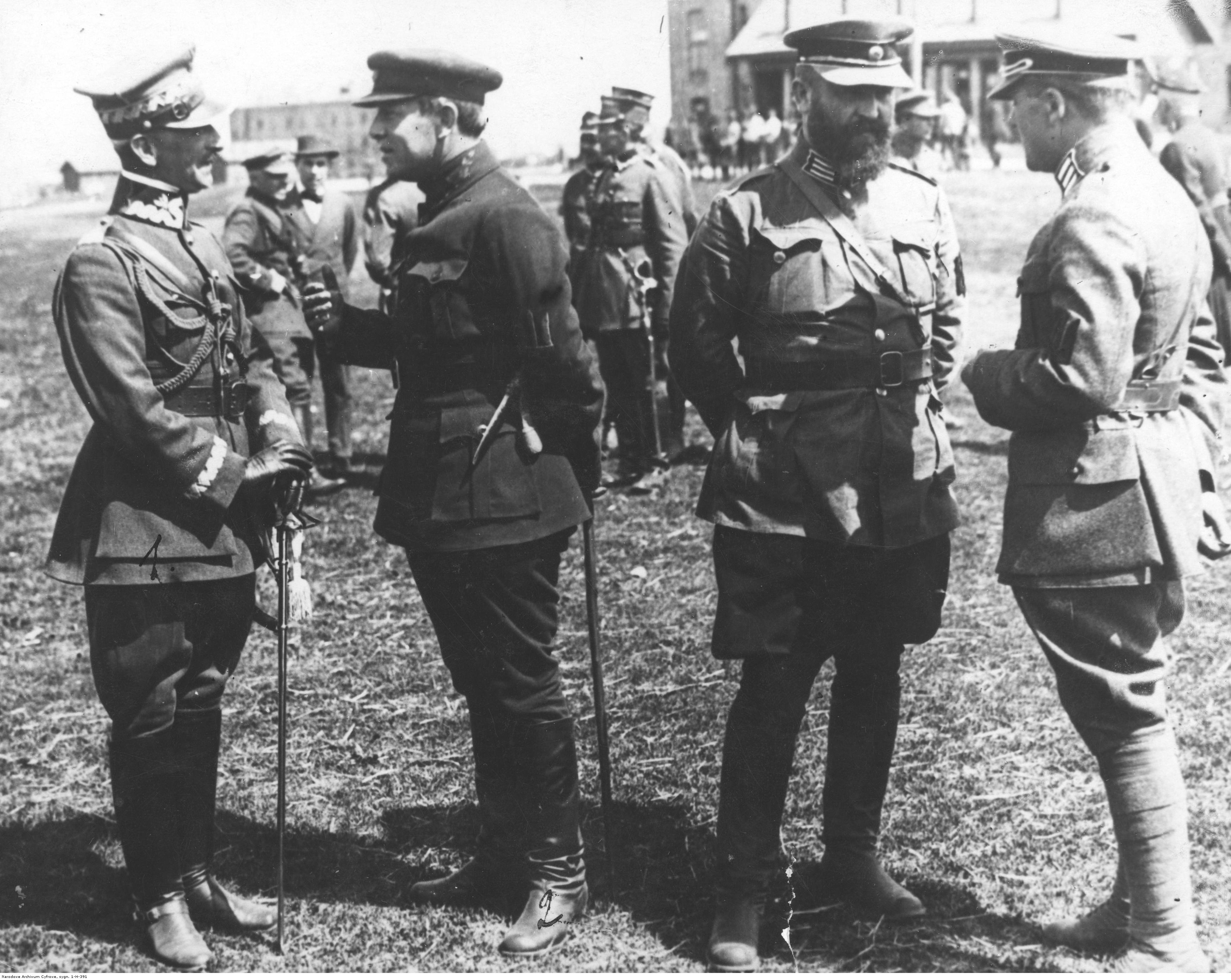 Wojna polsko-sowiecka. Generał Antoni Listowski (pierwszy z lewej) podczas rozmowy z atamanem Semenem Petlurą (drugi z lewej); kwiecień 1920 r. Koncern Ilustrowany Kurier Codzienny - Archiwum Ilustracji. Sygnatura: 1-H-391